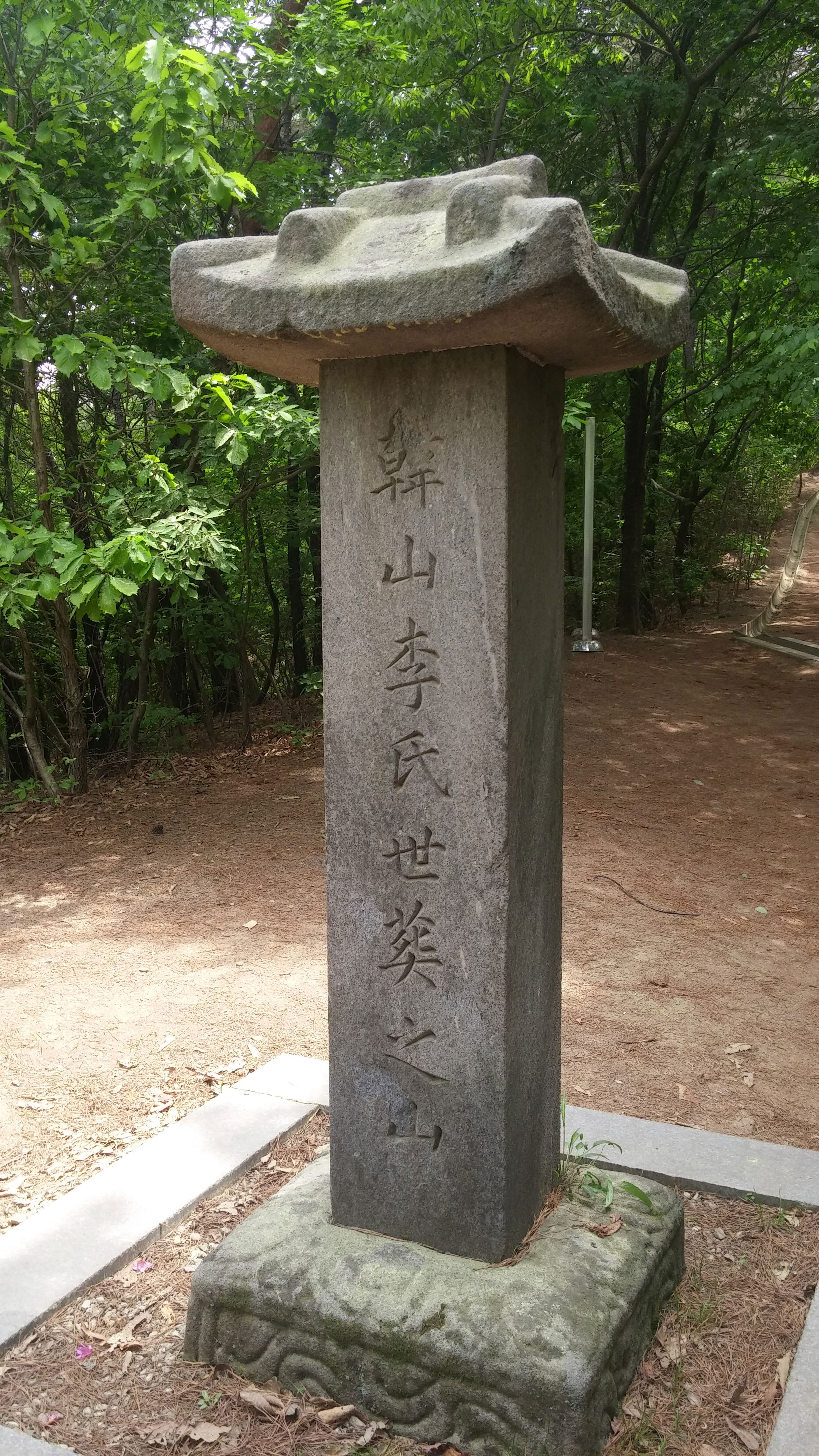 중앙공원-한산-이씨-문화유적-(1)